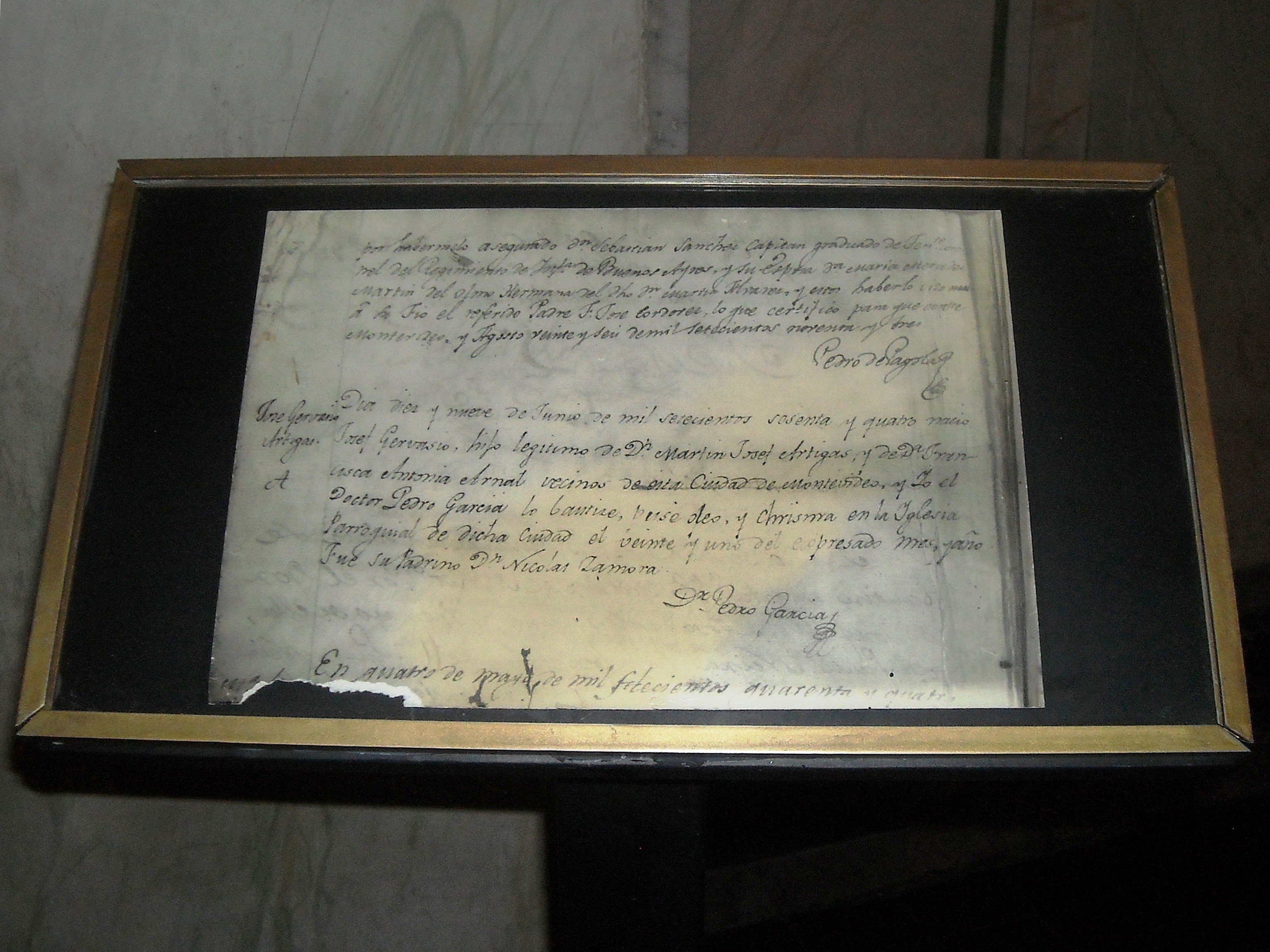 Catedral Metropolitana de Montevideo. Ubicada en el departamento de Montevideo